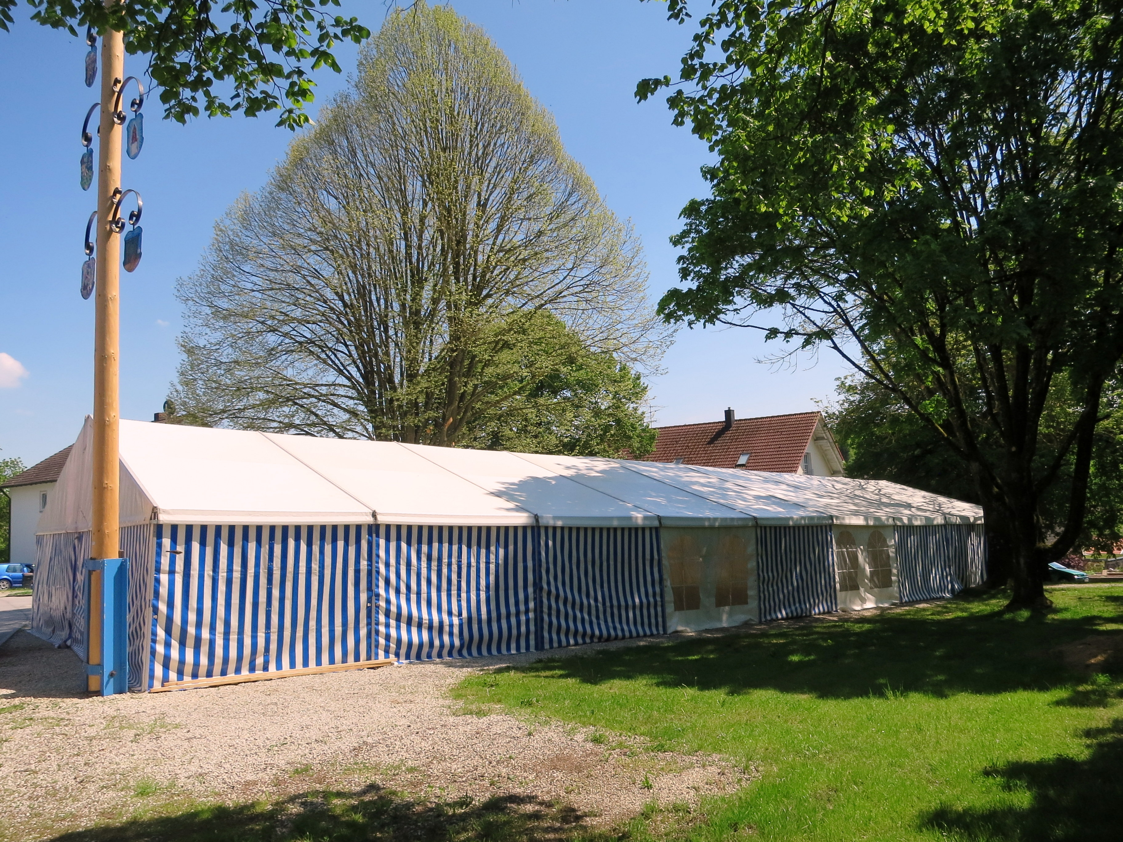 Für das leibliche Wohl der Marktbesucher ist gesorgt